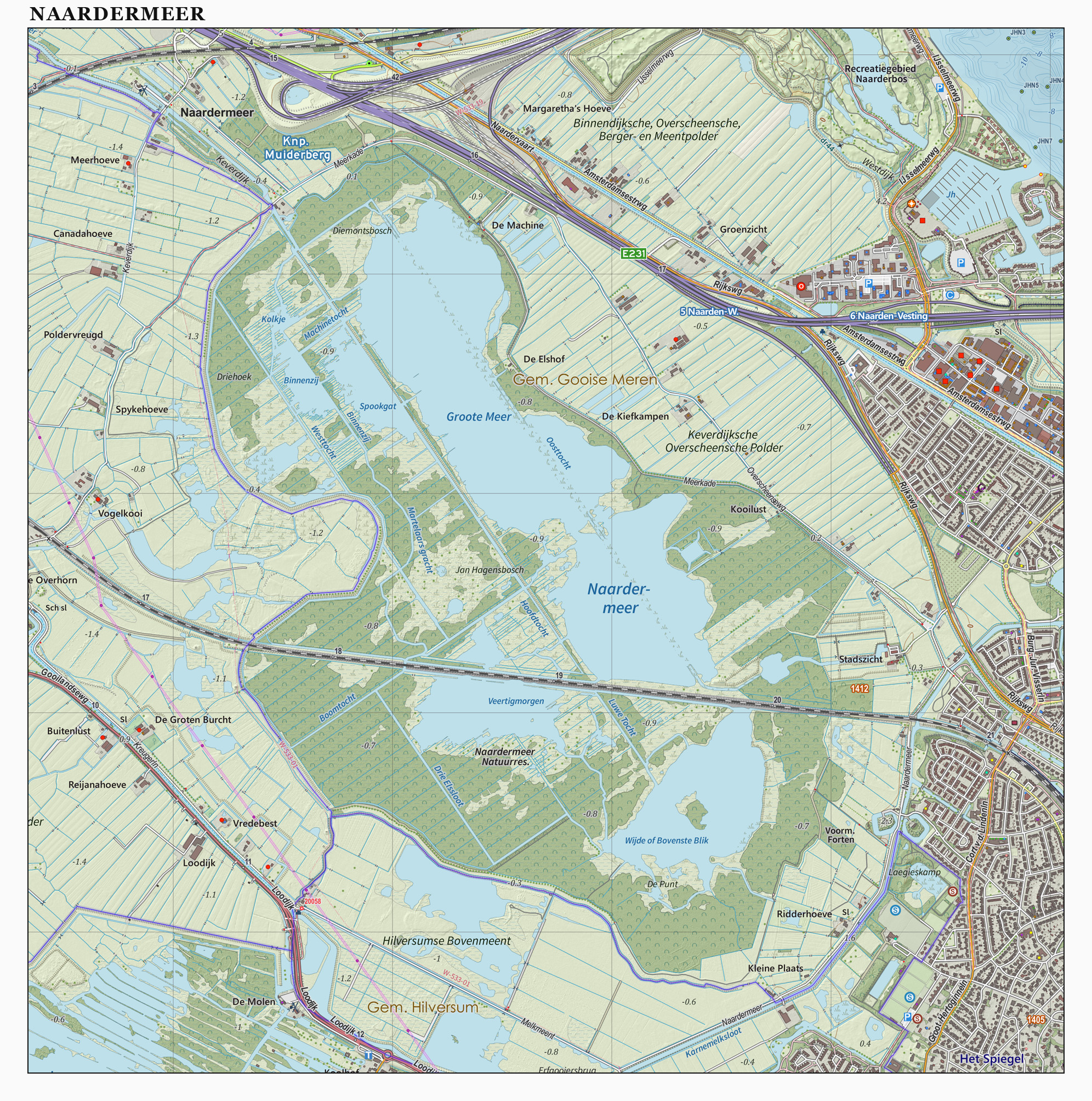 Topografische natuurkaart. Resolutie: 400 pixels/km. Samengesteld door Jan-Willem van Aalst op basis van de GML open geodata van de BRT/Top10NL (basisregistratie Topografie, Kadaster), vrijgegeven door Kadaster onder de Creative Commons BY licentie. Additionele gegevens uit BAG uit de Open Street Map en uit de Risicokaart. Zie ook de Legenda.